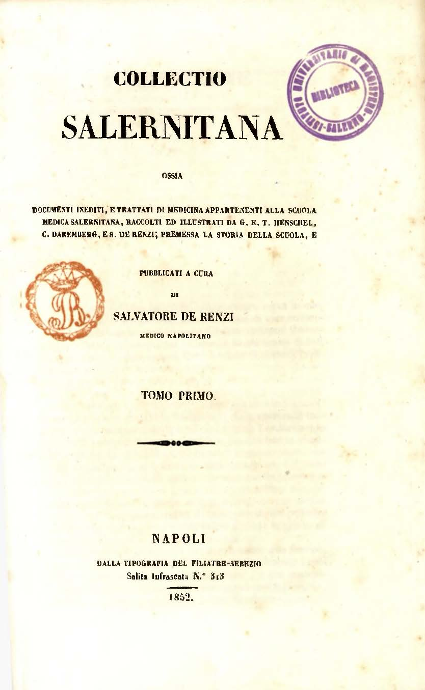 Collectio salernitana ossia documenti inediti e trattati di medicina appartenenti alla Scuola Medica Salernitana, raccolti ed illustrati da G.E.T. Henschel, C. Daremberg e S. De Renzi; premessa la storia della scuola e pubblicati a cura di Salvatore De Renzi medico napolitano. Tomo primo